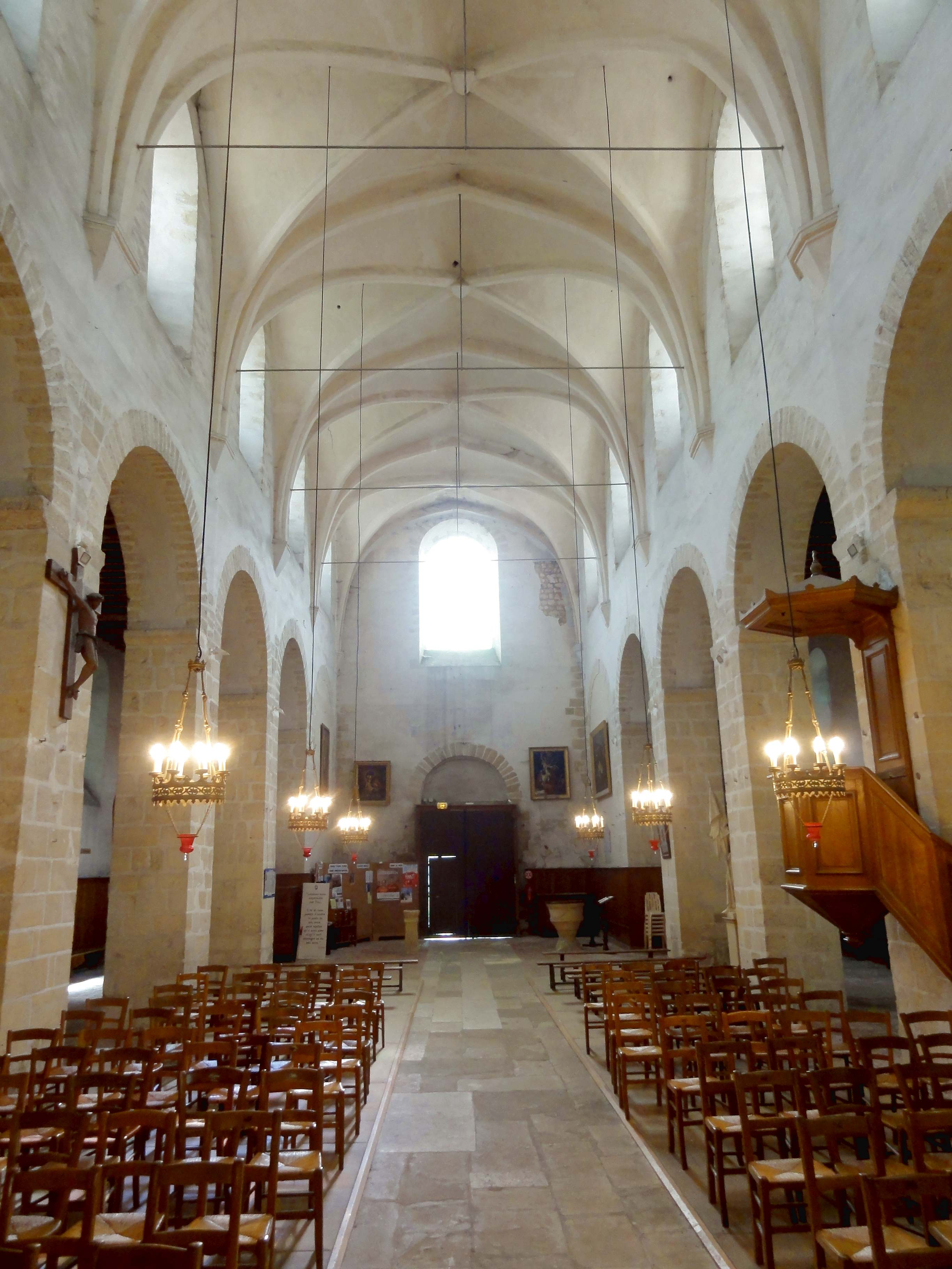 Intérieur de l'église - voir titre.